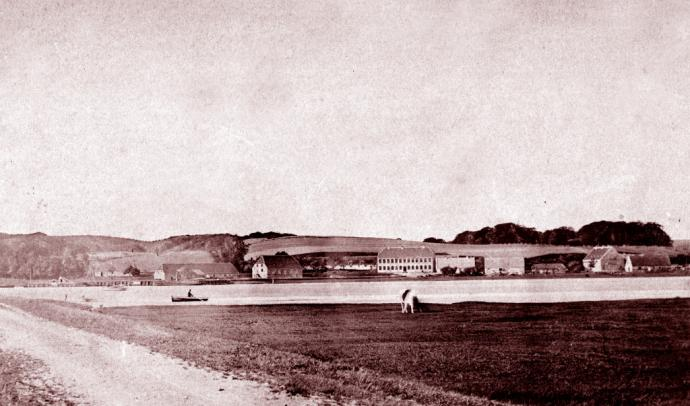 Hadsund set fra syd, 1878. Gæstgivergården og kornpakhusene dominerede landskabet. Taget i 1875 fra syd siden og ind over Hadsund hvor man b.la. kan se Hotel Hadsund.